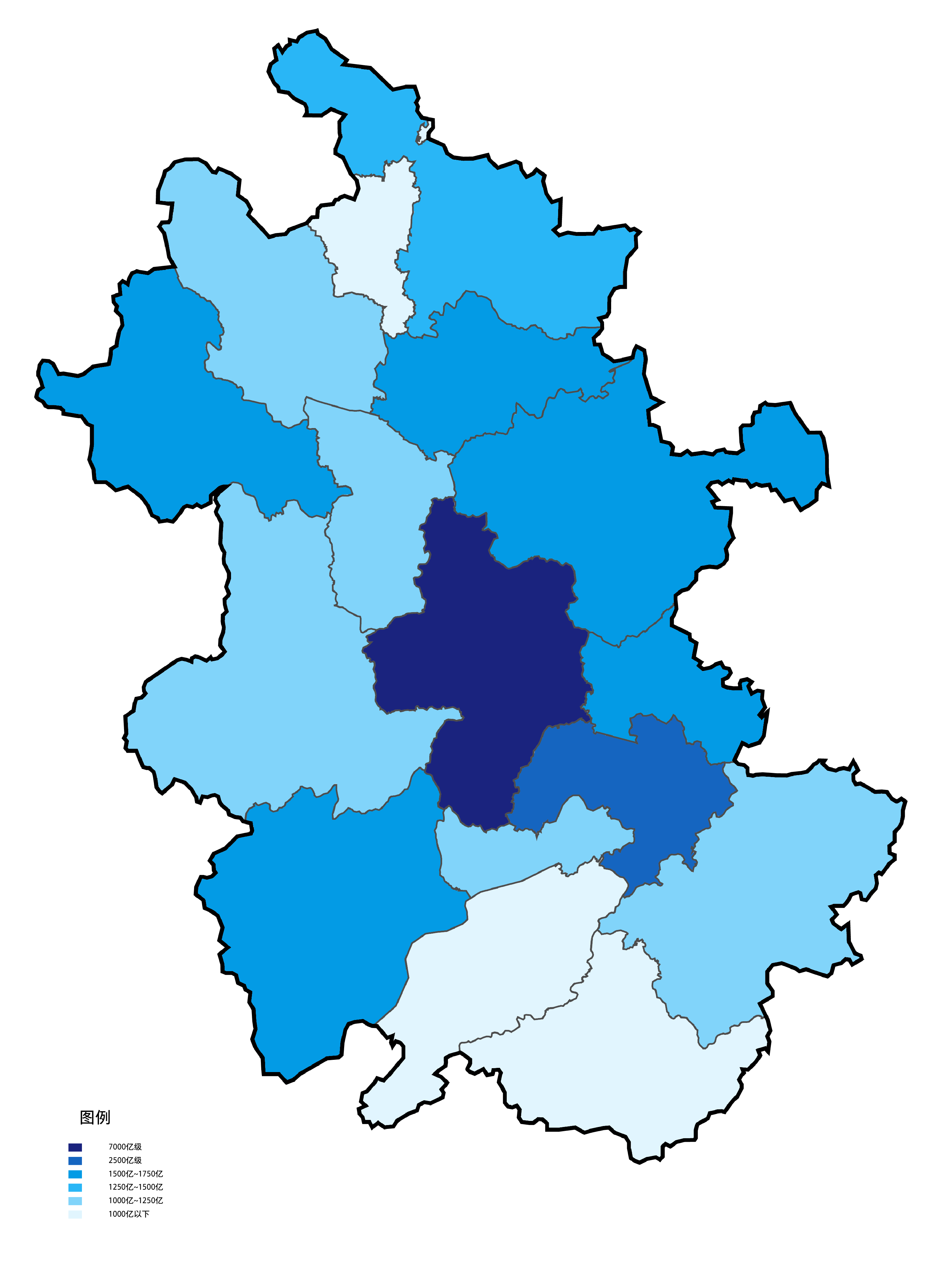 中文（中国大陆）: 安徽省各地级市根据2017年地区生产总值填色地图